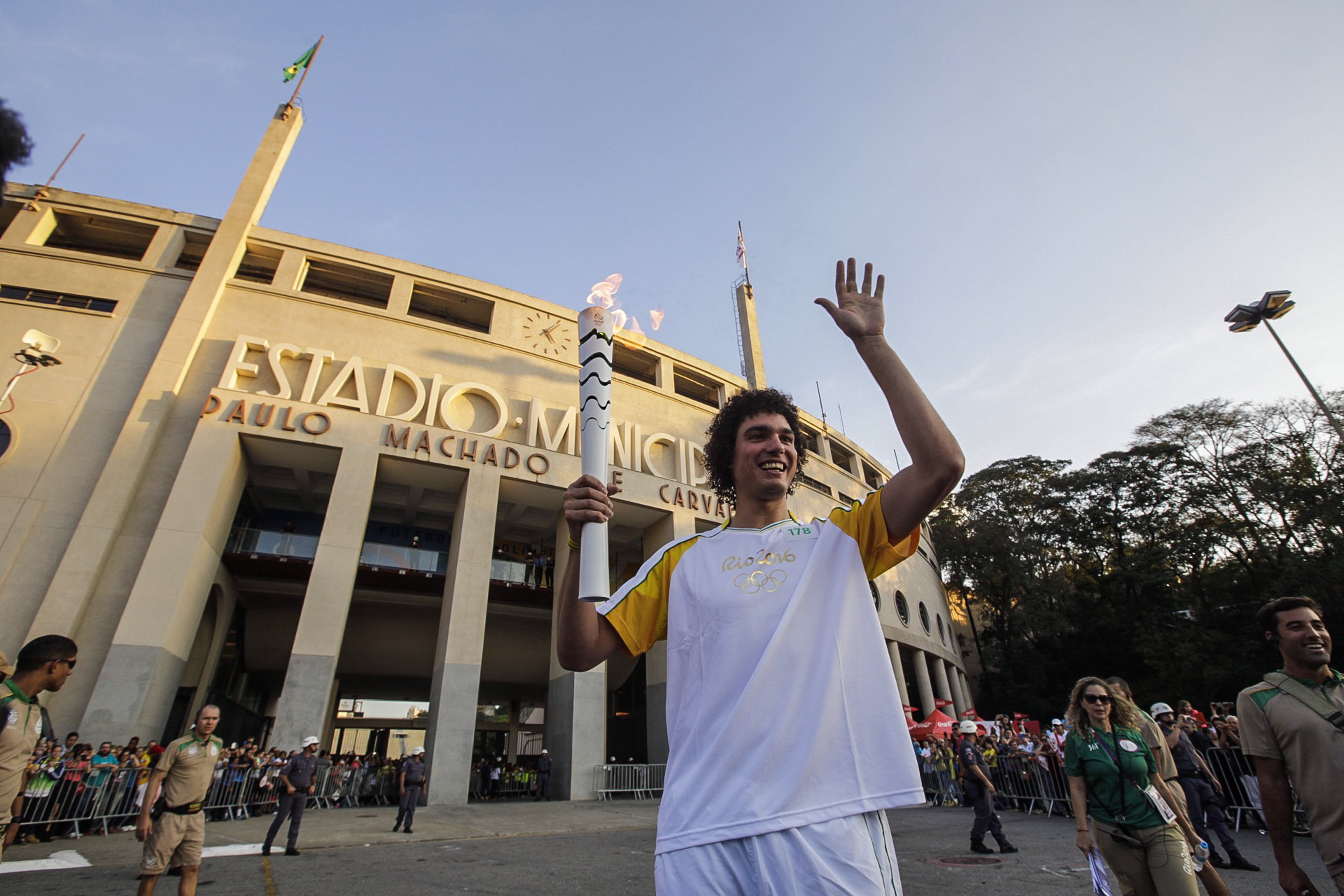 A cidade de São Paulo recebeu neste domingo (24) o revezamento da tocha olímpica. O percurso começou pouco antes das 8h, em frente ao Museu do Ipiranga, e percorreu pontos importantes da capital, como o Obelisco do Ibirapuera (Mausoléu ao Soldado Constitucionalista de 1932), Pinacoteca do Estado, Estação da Luz, Estádio do Pacaembu e o Memorial da América Latina. Foto: Daniel Guimarães/ A2IMG